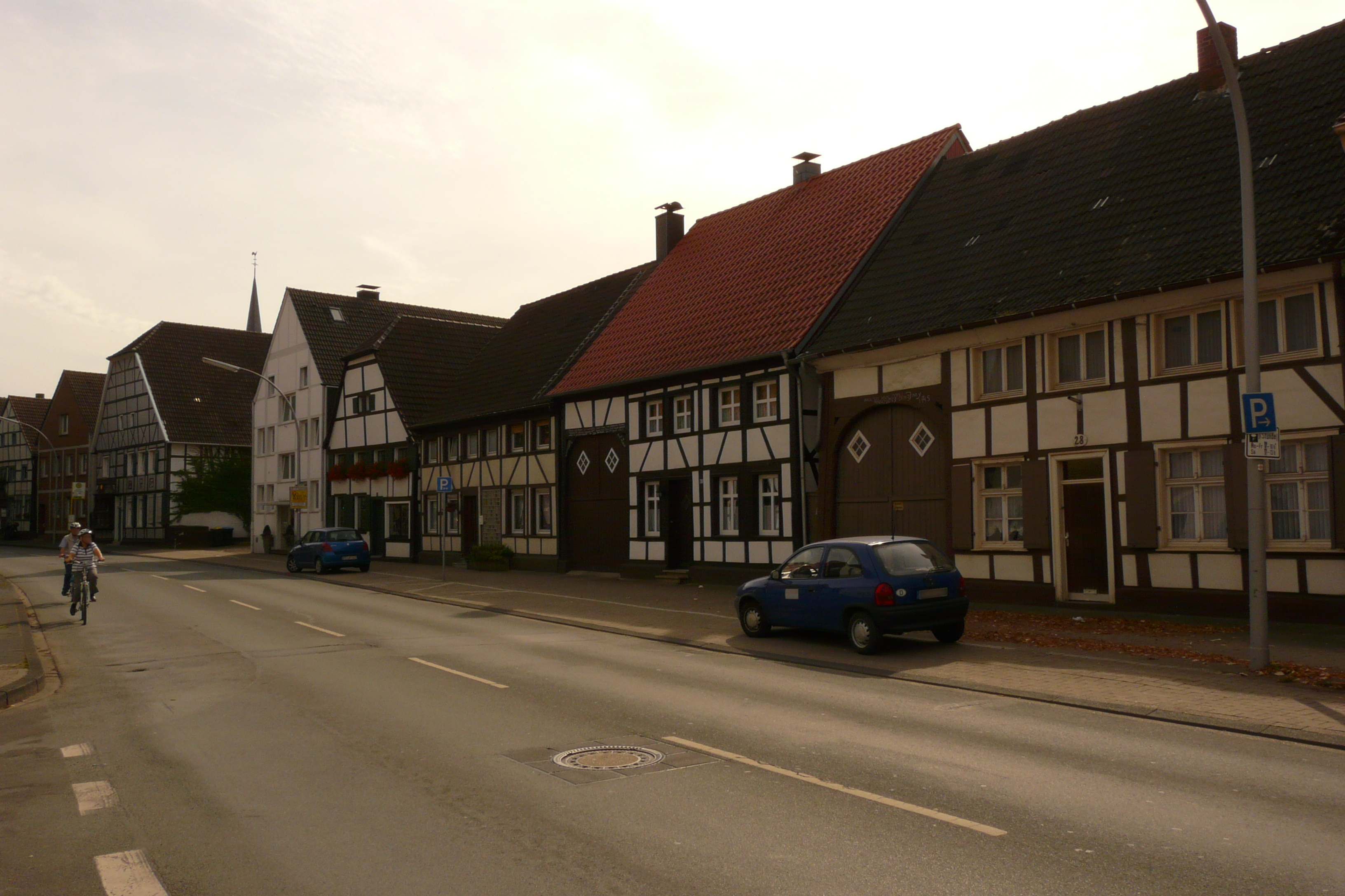 Horneburger Straße, Ortsdurchfahrt Horneburg|Horneburg (Datteln)|Horneburg